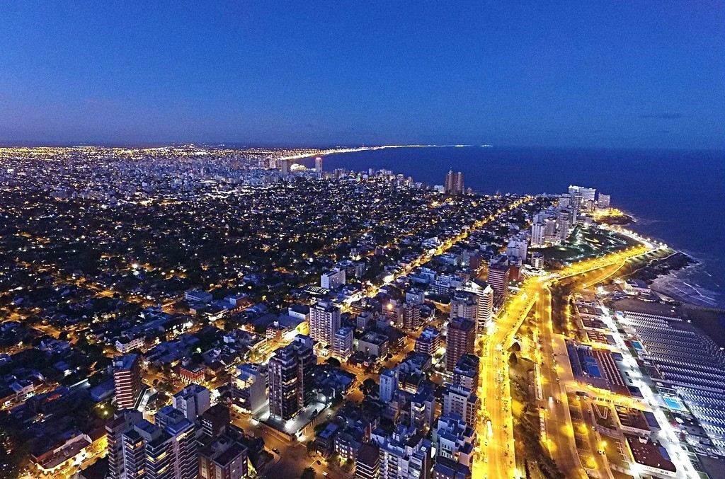 atardecer marplatense